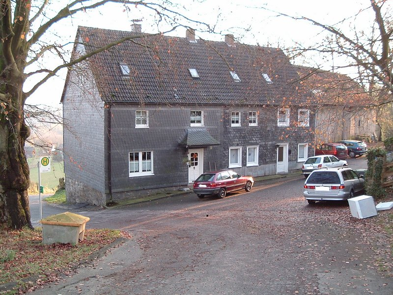 Markante Ortsdurchfahrt von Oberdahl in Radevormwald Fotografiert von Benutzer:Taube Nuss im November 2004